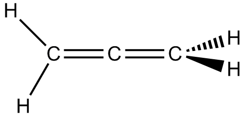 Aleno